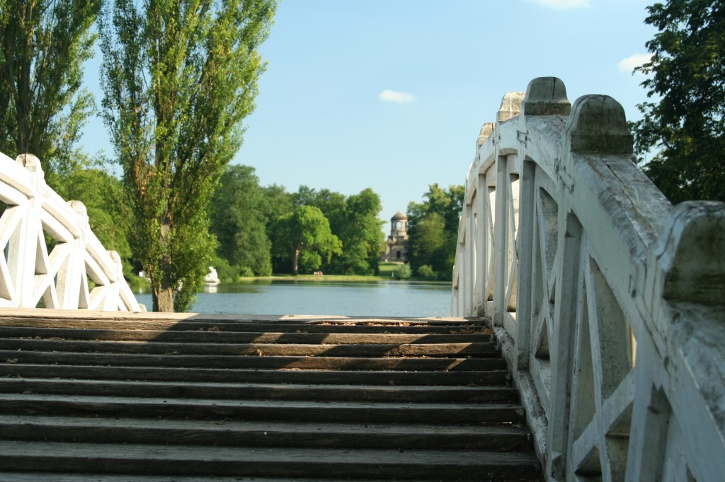 Schwetzingen, Chinesische Bruecke